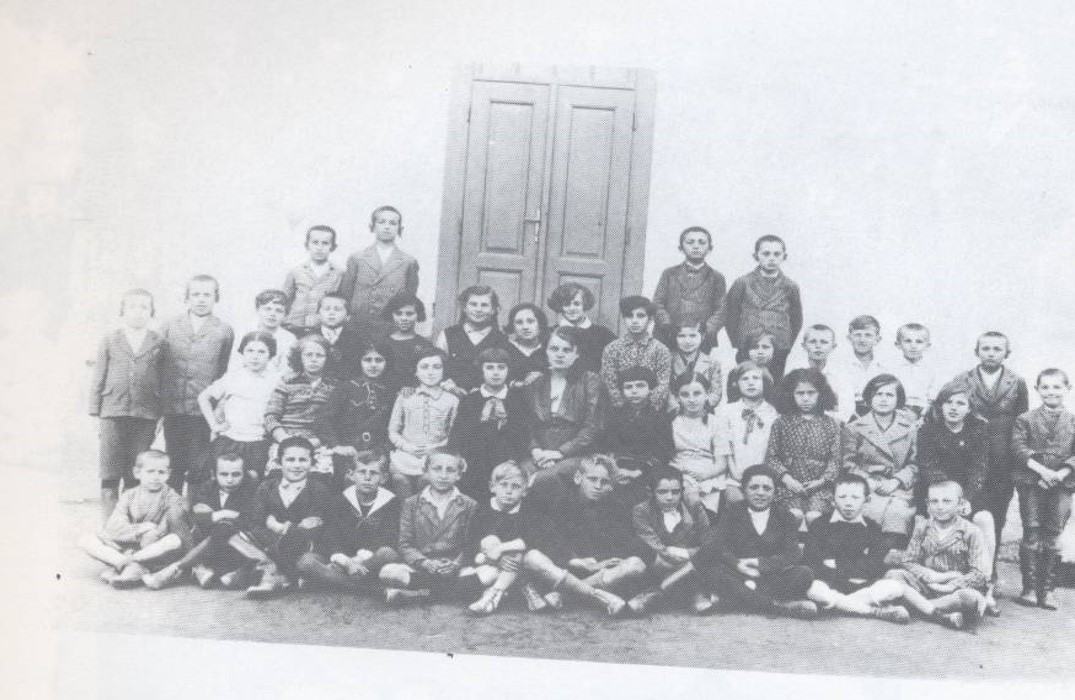 תמונת מחזור מבית הספר הממלכתי יהודים בלבד